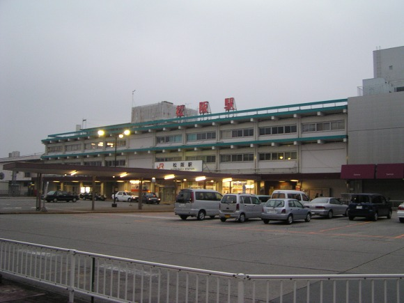 JR松阪駅